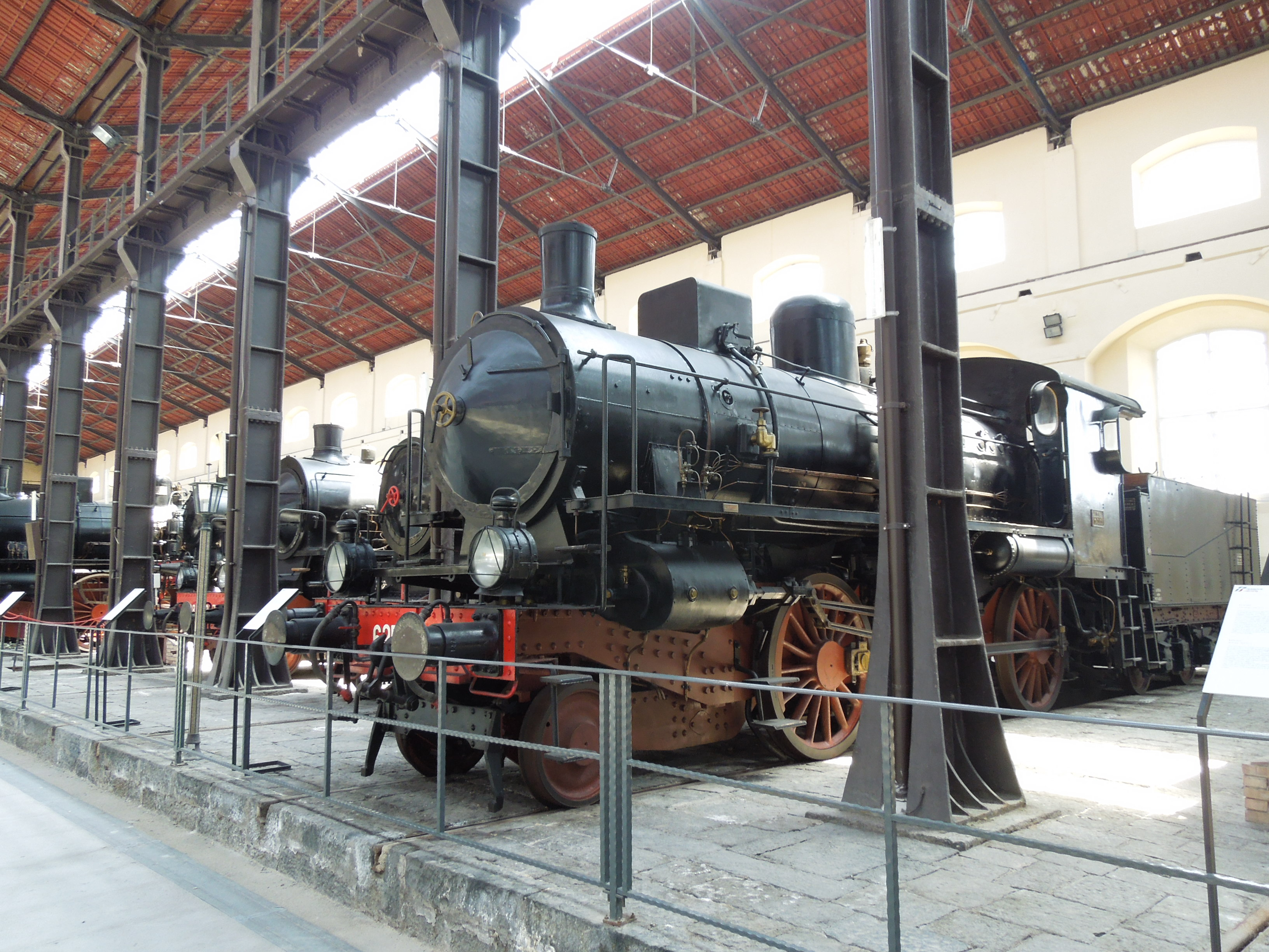 A Pietrarsa vasúttörténeti múzeum